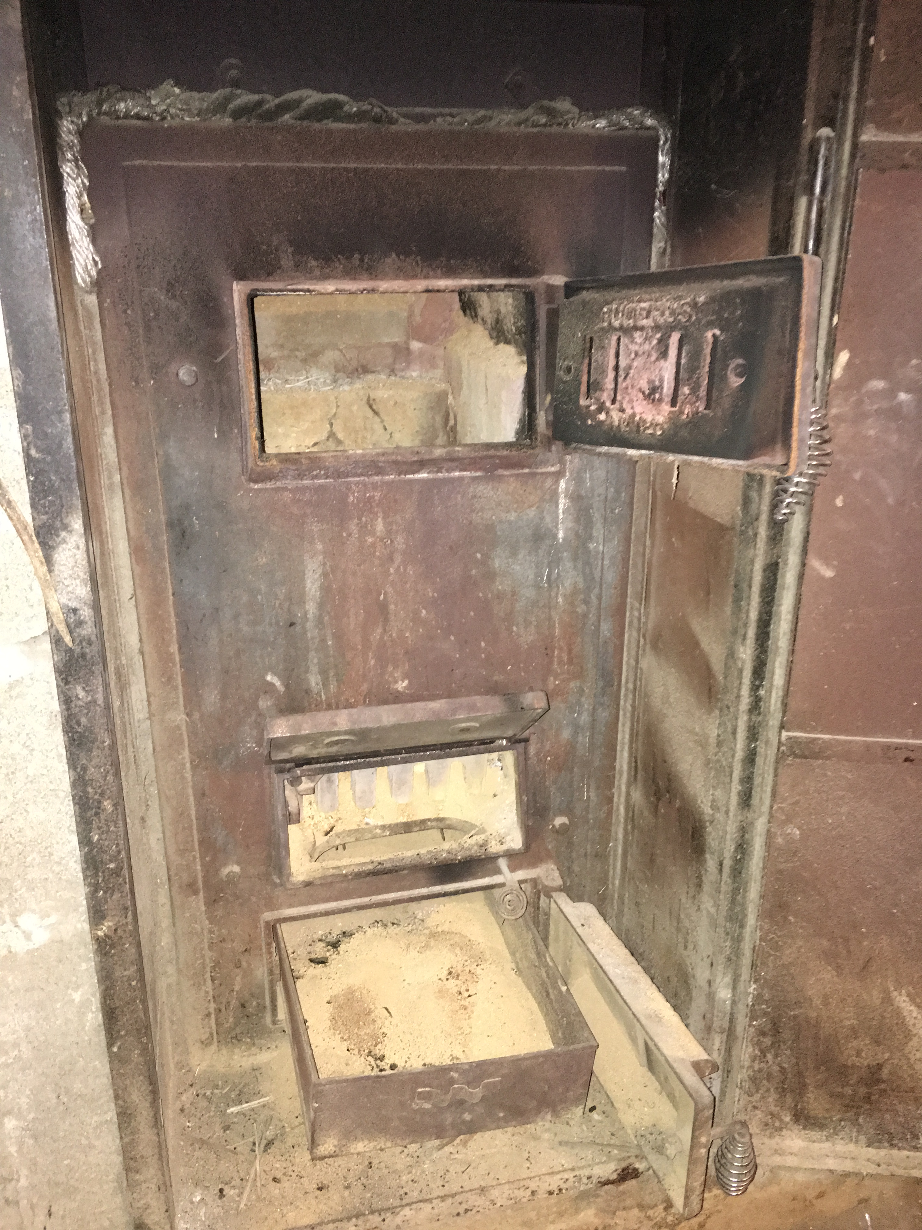 Brennkammer der Festbrennstoffheizung mit geöffneten Klappen. Unten die Aschekammer, darüber die Brennkammer und oben die Öffnung zum nachlegen von Holz oder Kohle.